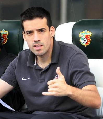 Ілсінью - бразильський футболіст під час виступів за Шахтар на фіналі Кубку України